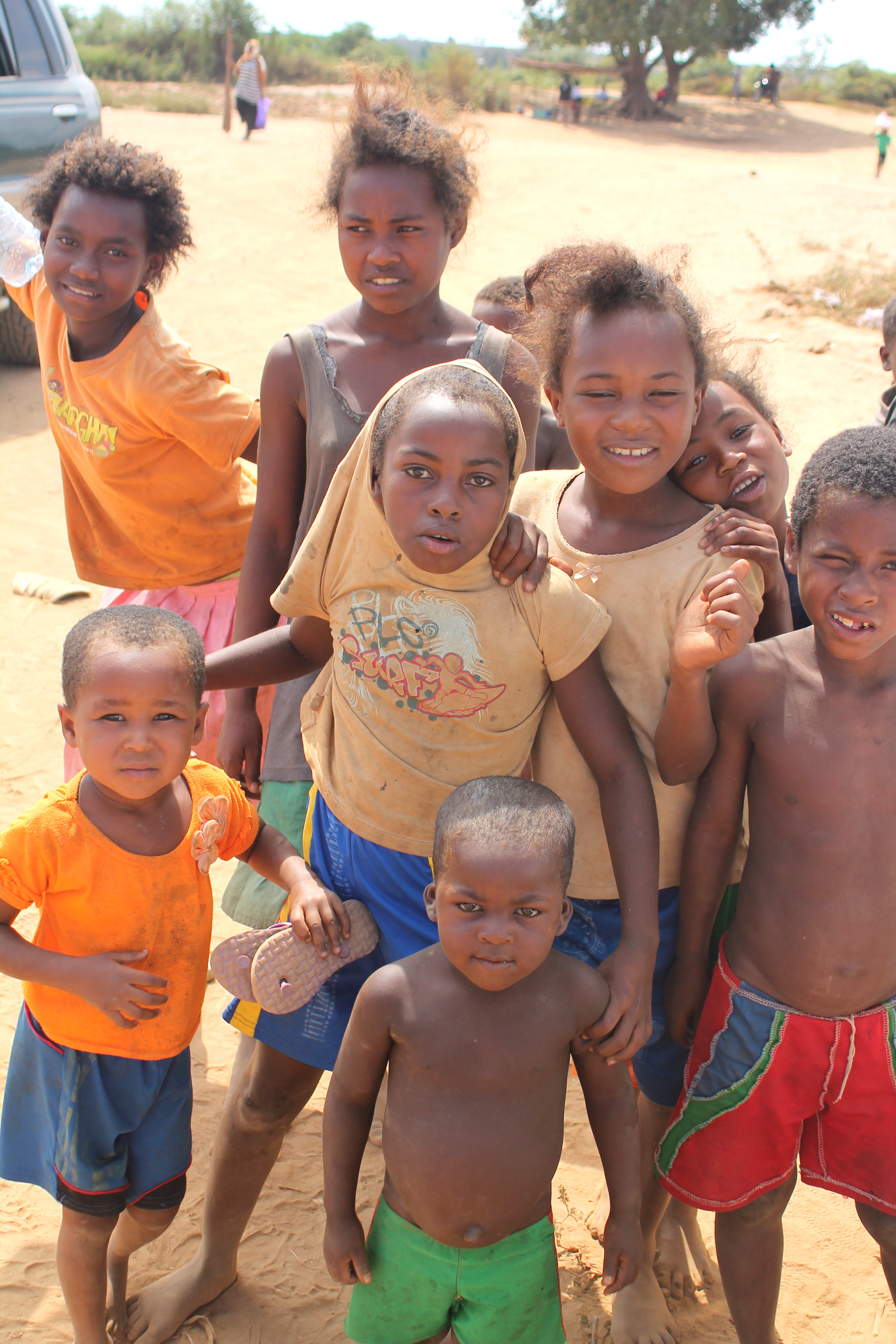 Sakalava